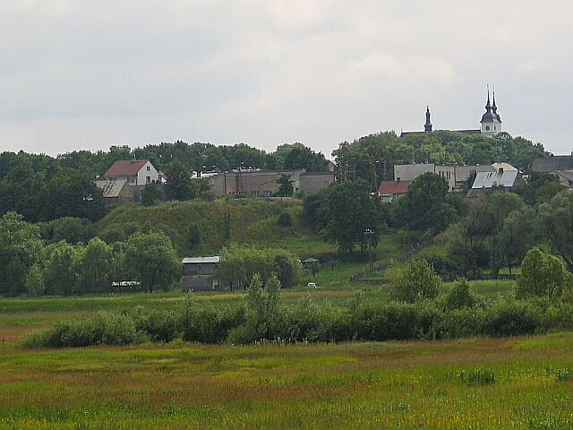 Goniądz; zdjęcie udostępnione przez Dixi (c) 2005 na bazie GNU FDL